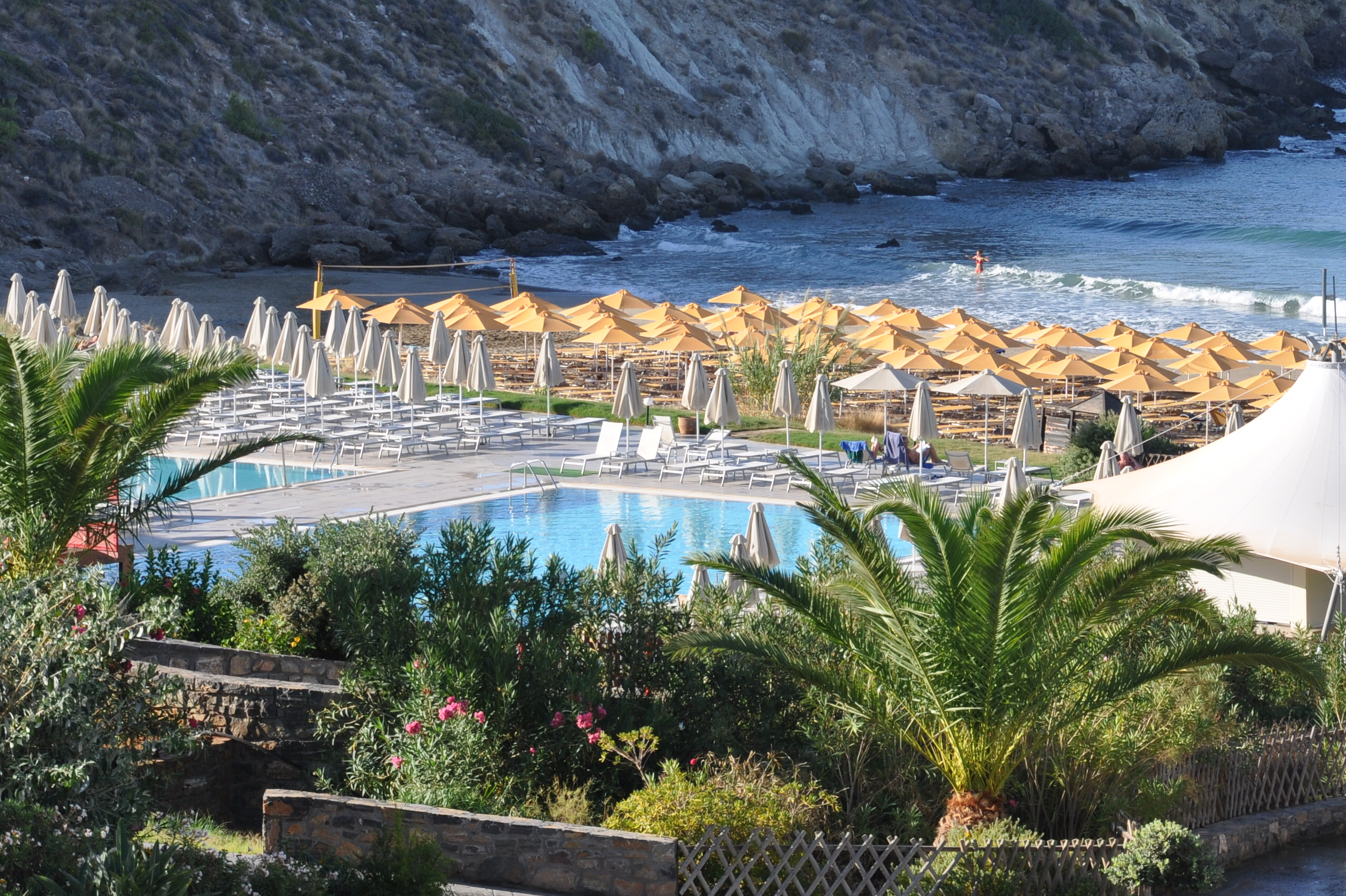 Analipsi 720 55, Greece